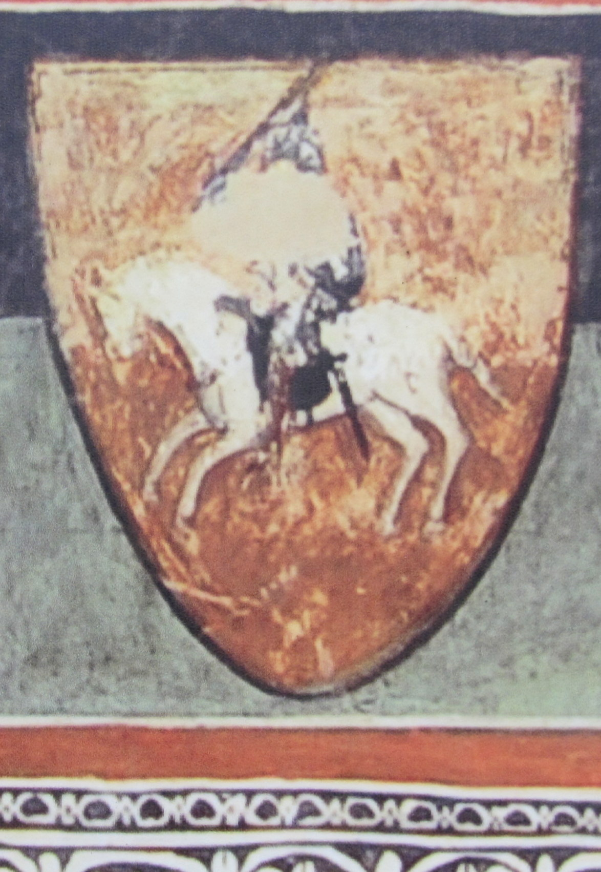 Fragment fryzu heraldycznego przedstawiającego herb Wielkiego Księstwa Litewskiego namalowany w XIV wieku w północnej części prezbiterium katedry w Sandomierzu. Jest to najstarsze barwne przedstawienie herbu Litwy.